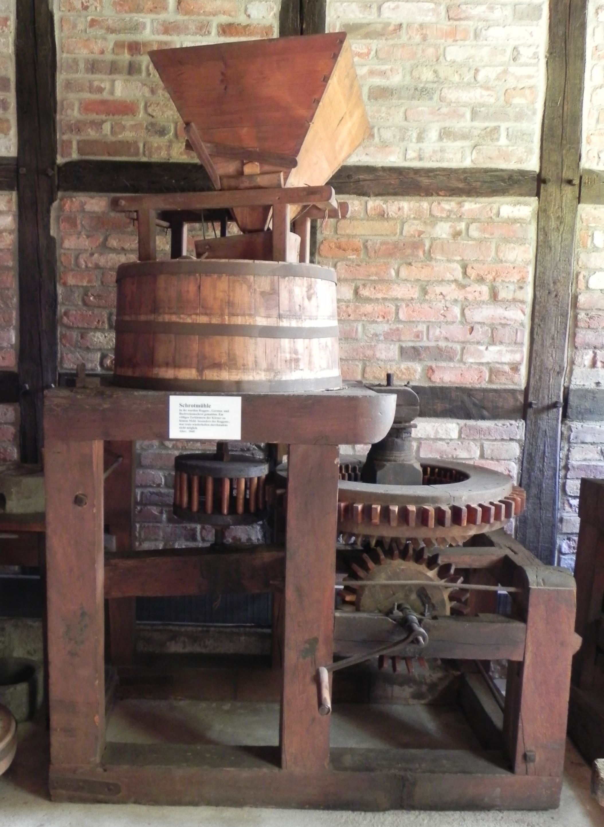 Schrotmühle von 1840 im Museum Römstedthaus in Bergen (Landkreis Celle)